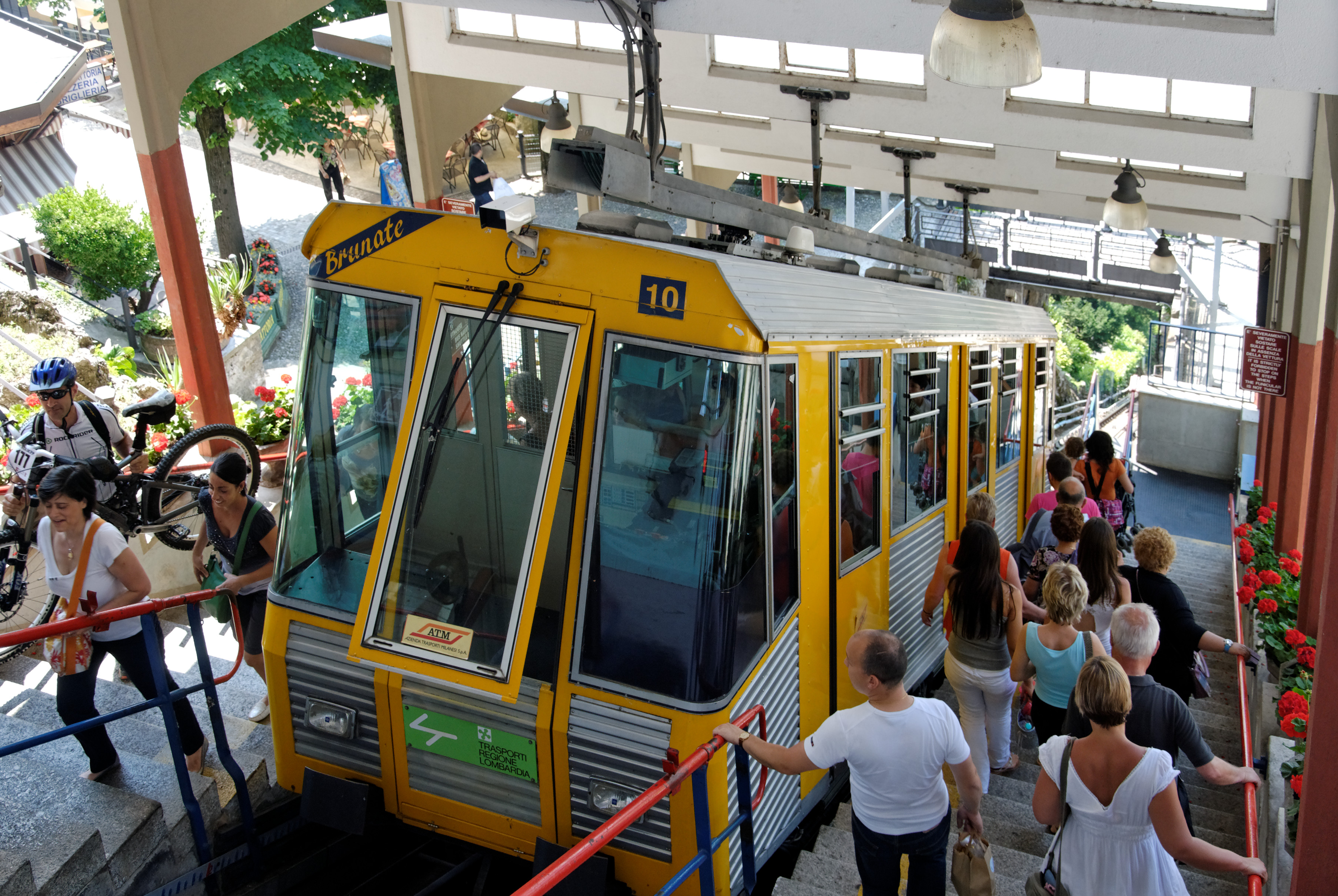 Vettura della funicolare Como-Brunate pronta alla partenza nella stazione a monte.